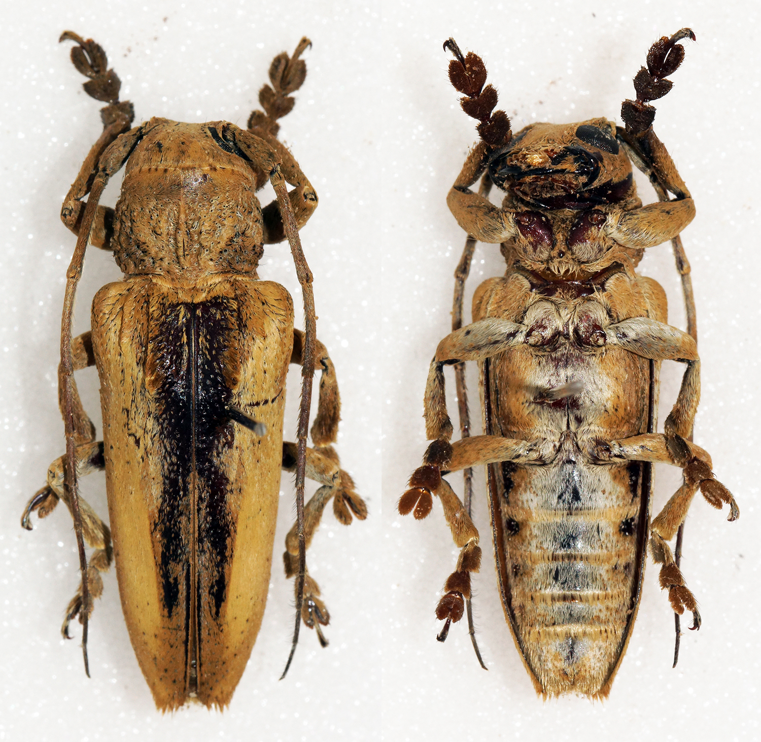 Gahan,1898 Sex: Male Data: 06-2010 - Mt Dayinshan - Yunnan Prov - China Size: 29mm